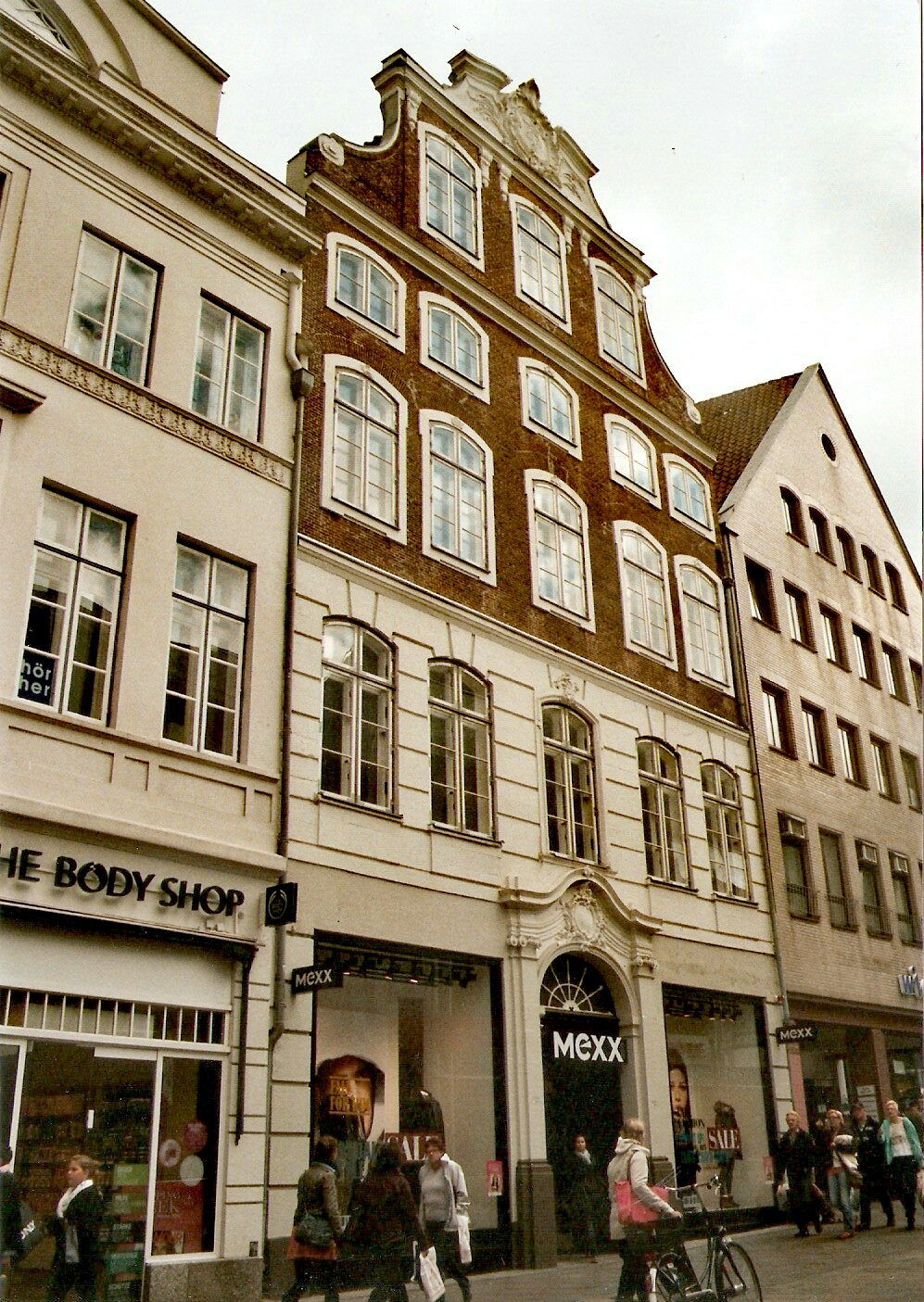 Das Robert’sches Haus, Gesamtansicht